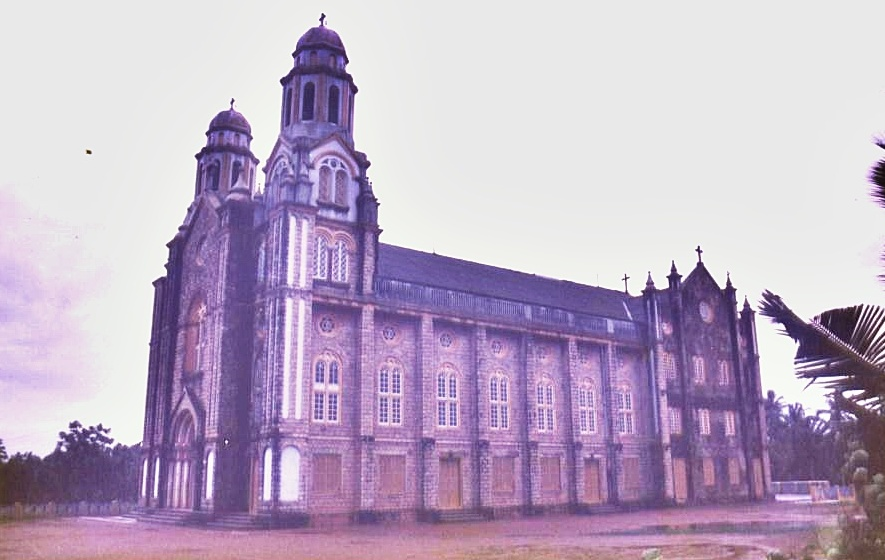 St. Mary`s Syro-Malankara Cathedral Trivandrum, Kerala